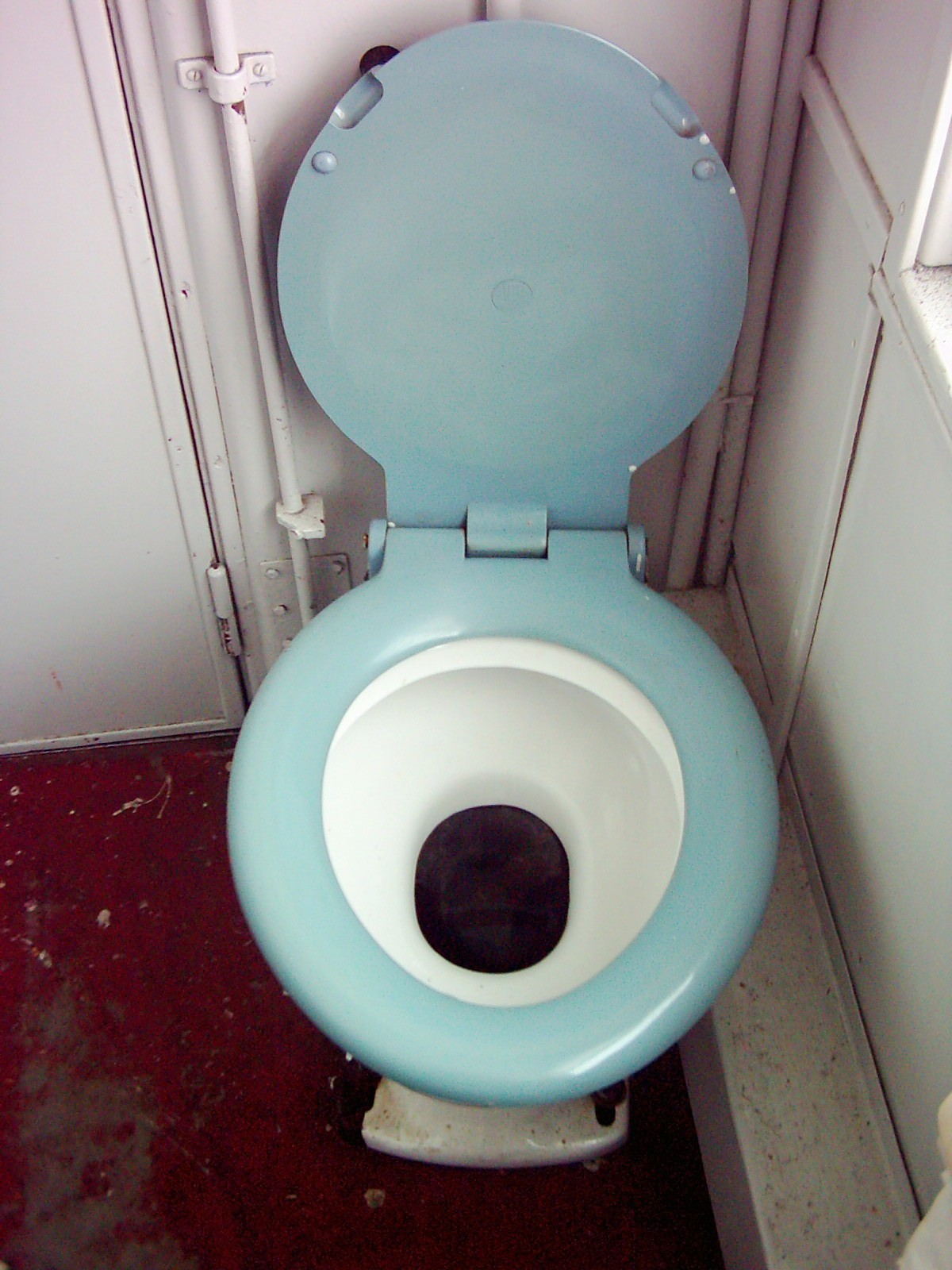 Toilette in einem historischen Zug, aufgenommen während einer Sonderfahrt in Hamburg.